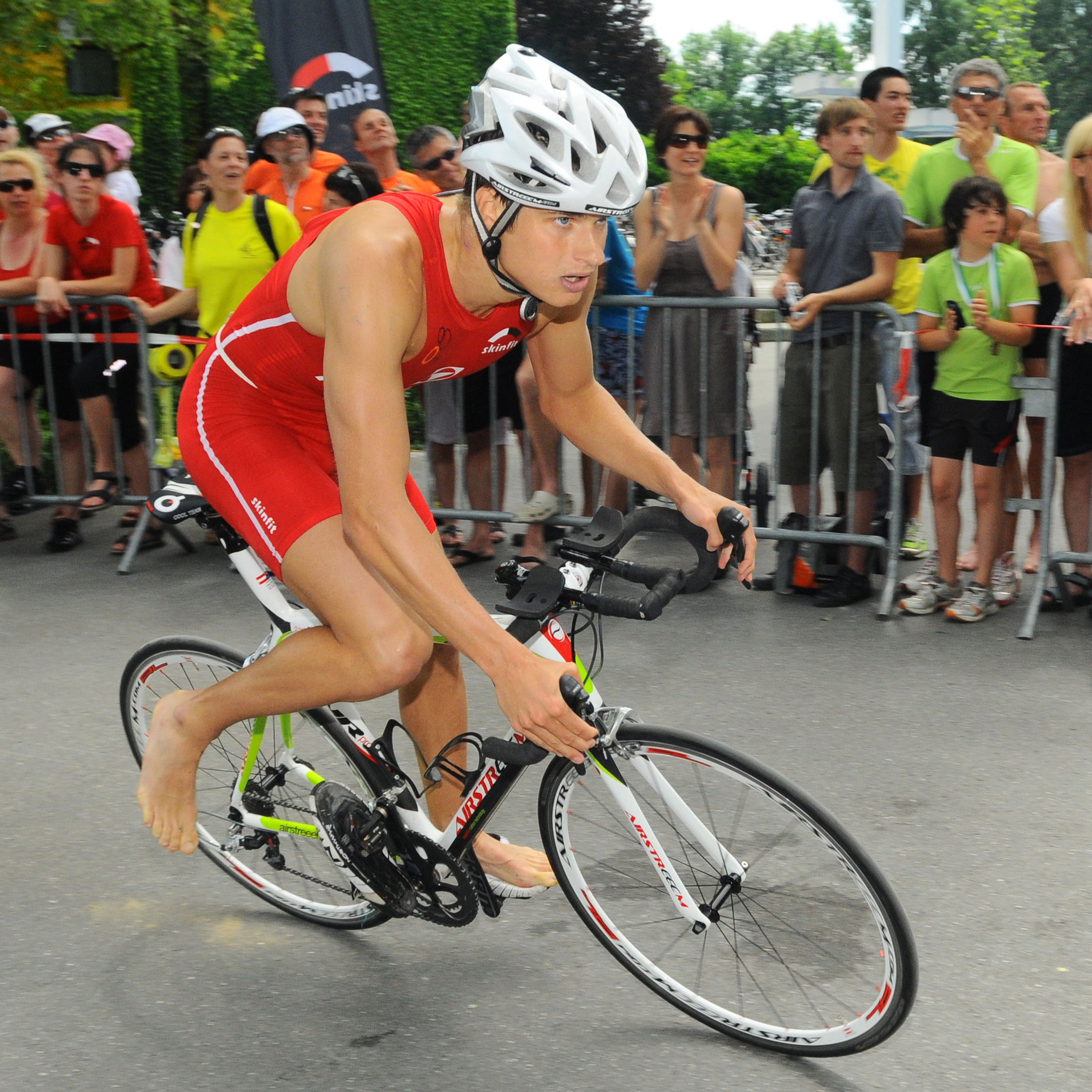 Paul Reitmayr beim Luschnouar Ironmännli 2010 (6. Juni 2010)